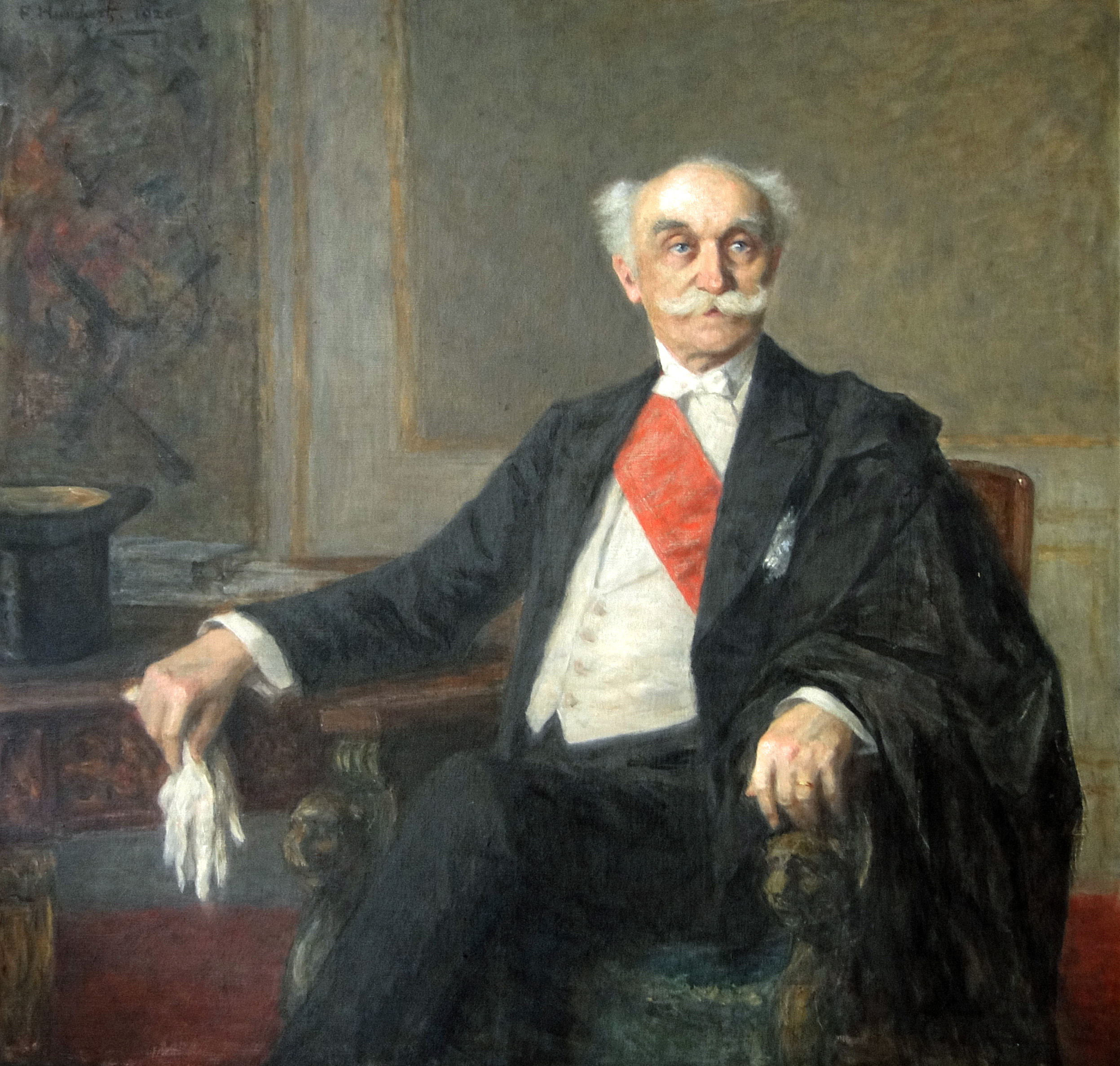 Justin de SELVES, tableau au musée de l’Histoire de France à Versailles.